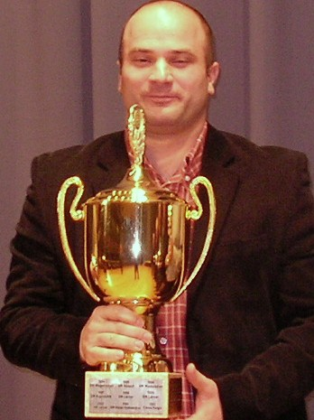 Misa Pap, 28. ChessOrg Schachfestival 2012 in Bad Wörishofen.